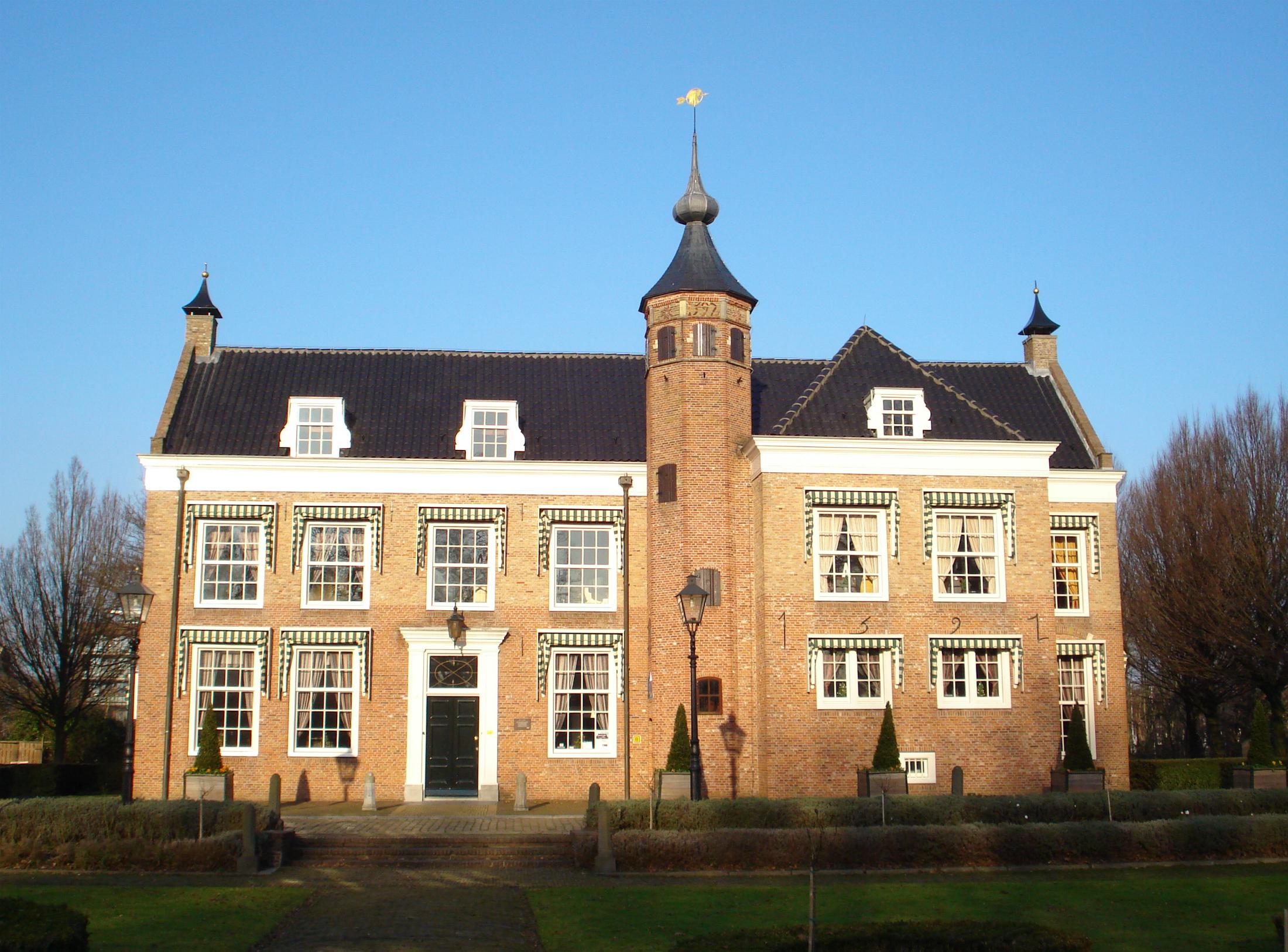 Rotterdam, Kromme Zandweg, Villa. Rijksmonument.